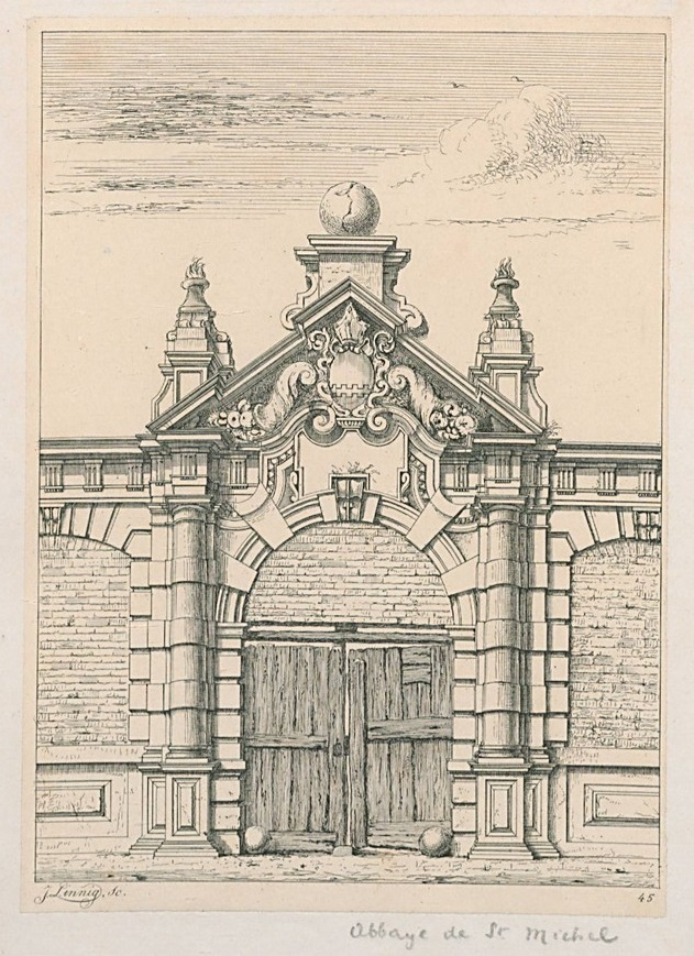 Frans Hendrik Mertens: Portal der (in den 1820er Jahren zerstörten) St.-Michaels-Abtei Antwerpen im Jahr 1868